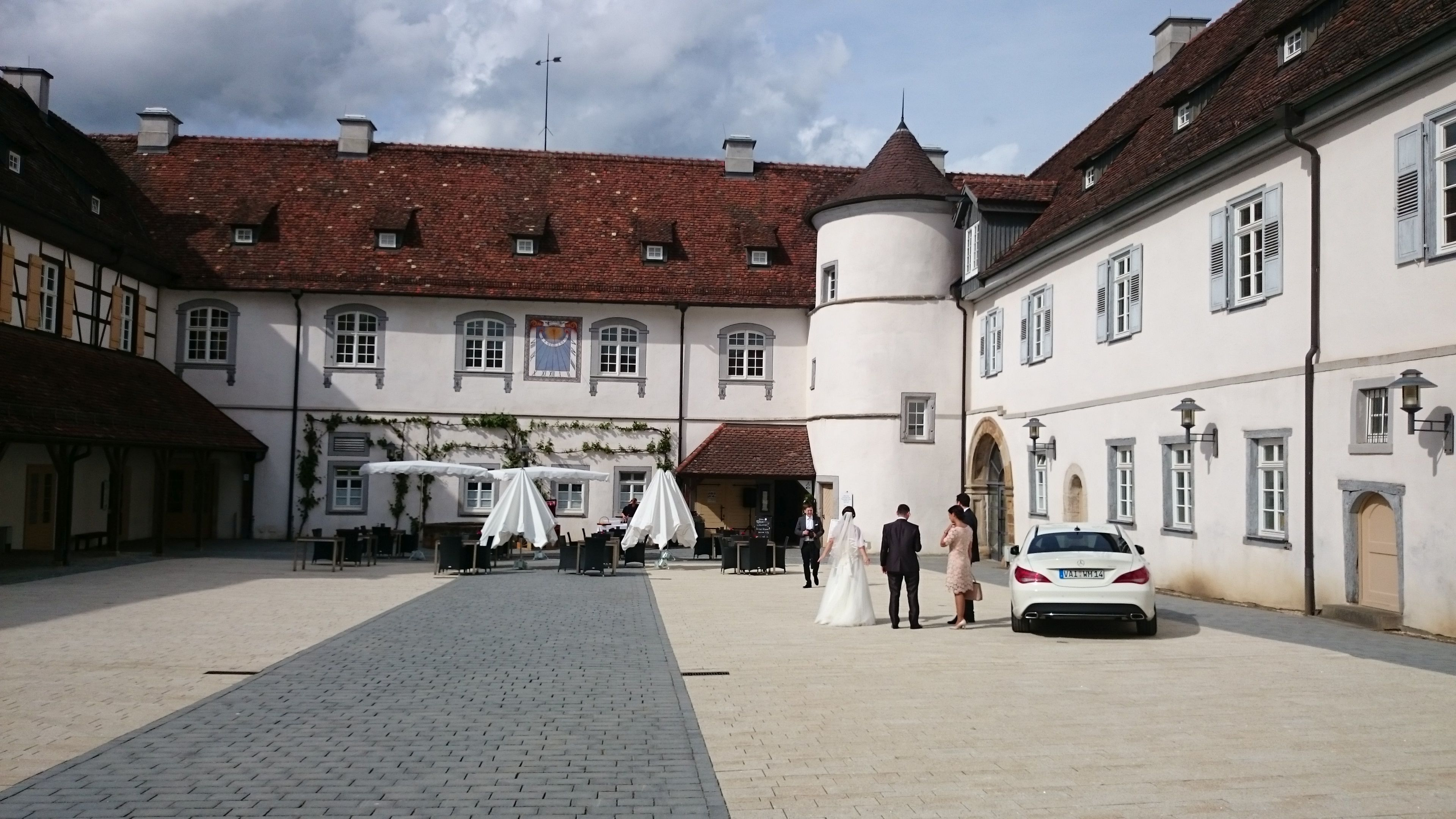 Hochzeit in Schloss Filseck